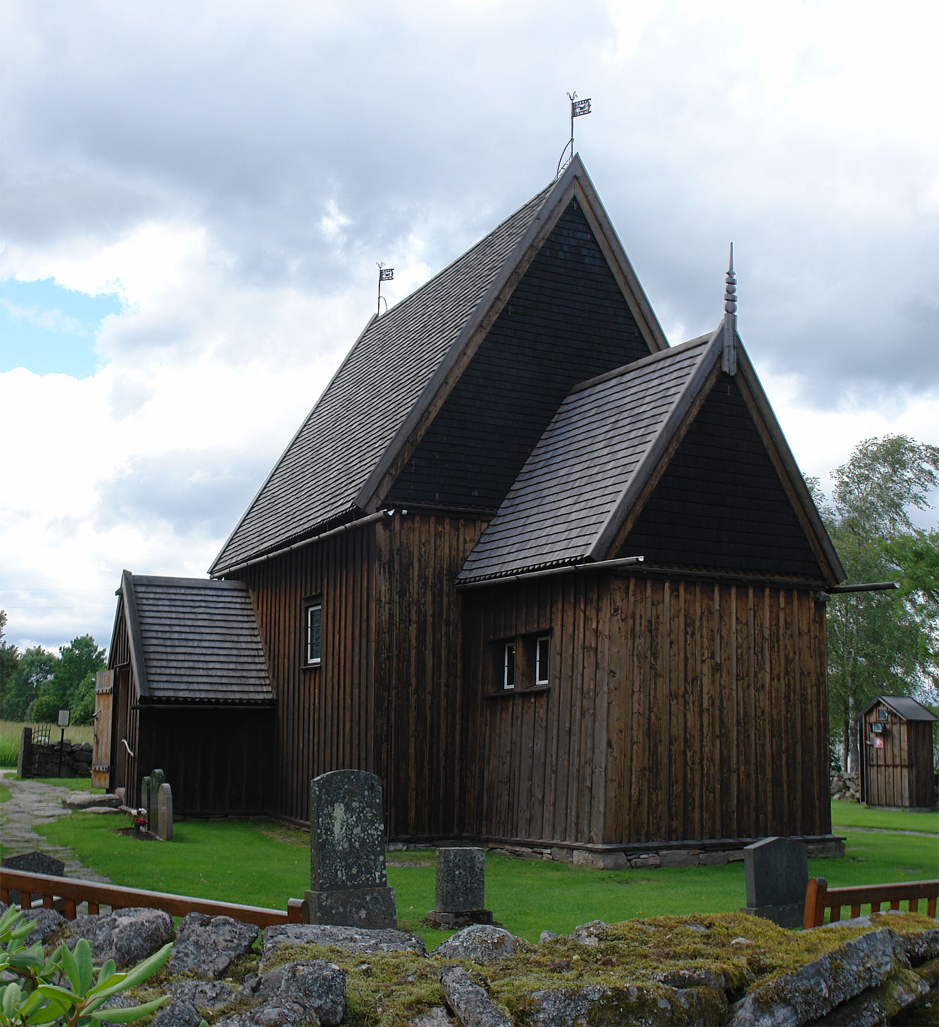 Die Stabkirche Hedared von 1506 ist die einzige erhaltene mittelalterliche Kirche dieser Bauart in Schweden. Blick von Osten auf Chor, Langhaus und Eingang